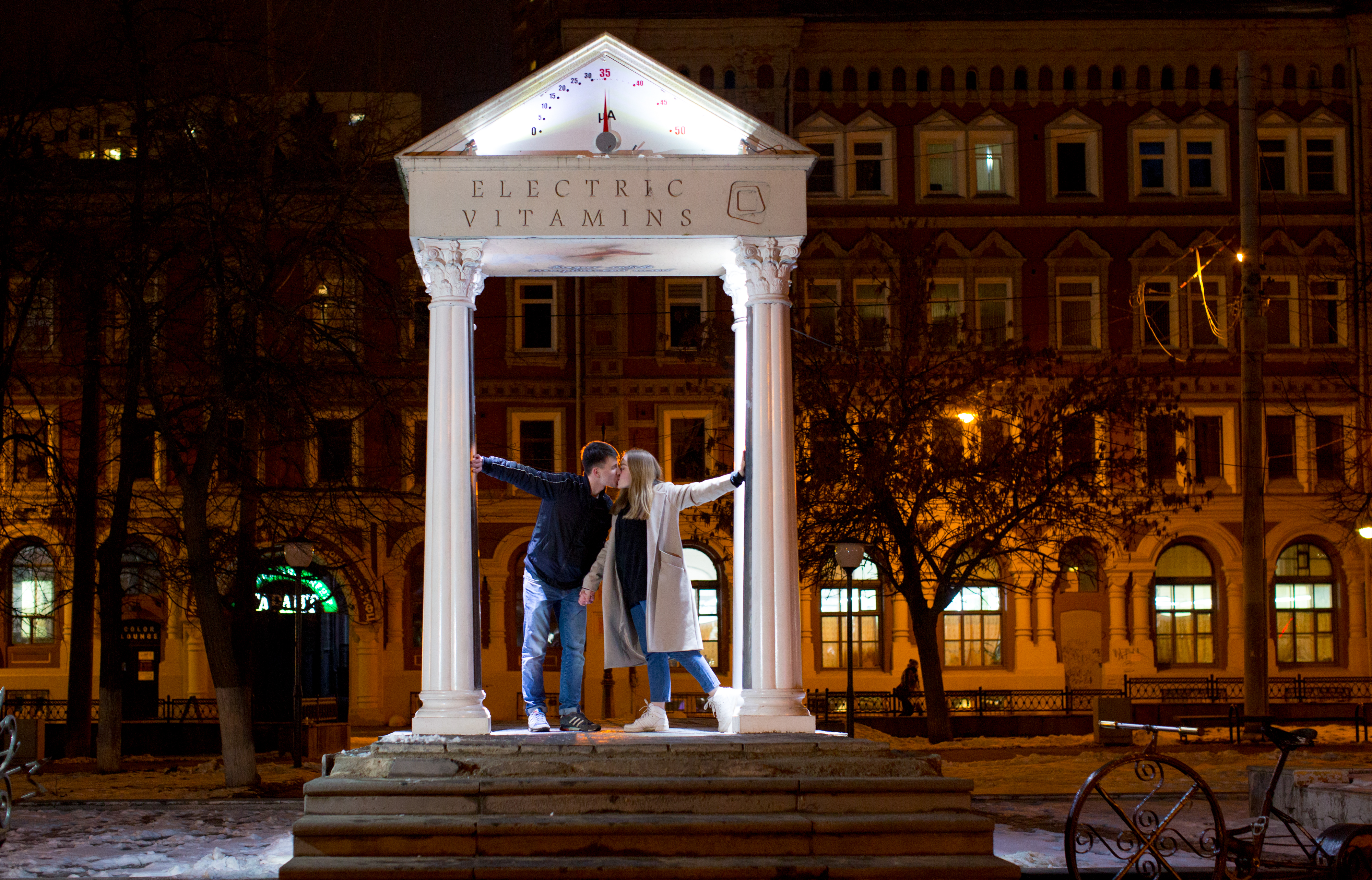 Арка электрических витаминов в ней влюбленные целуются, стрелка амперметра отклоняется